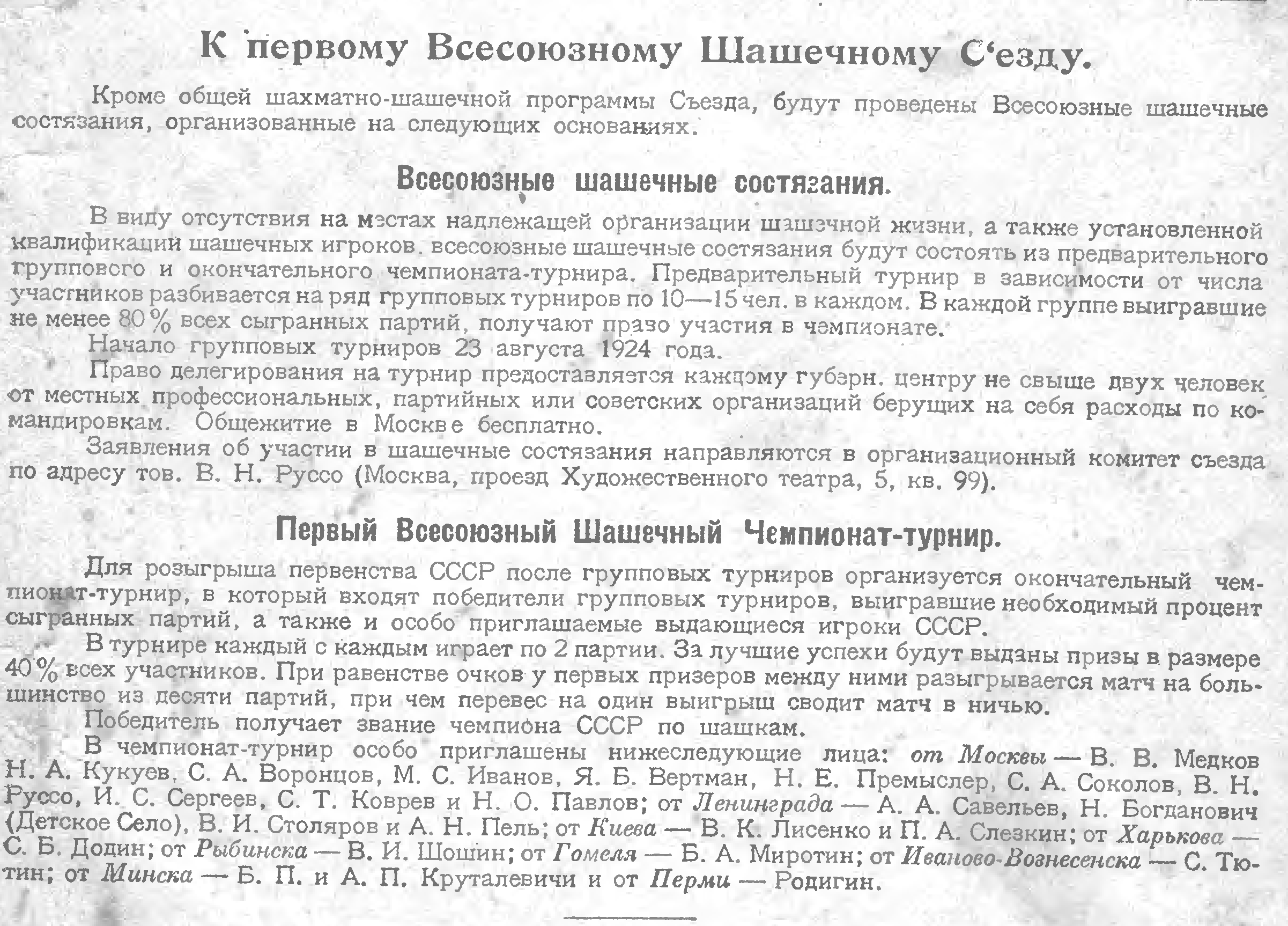 Положение о I чемпионате СССР по русским шашкам